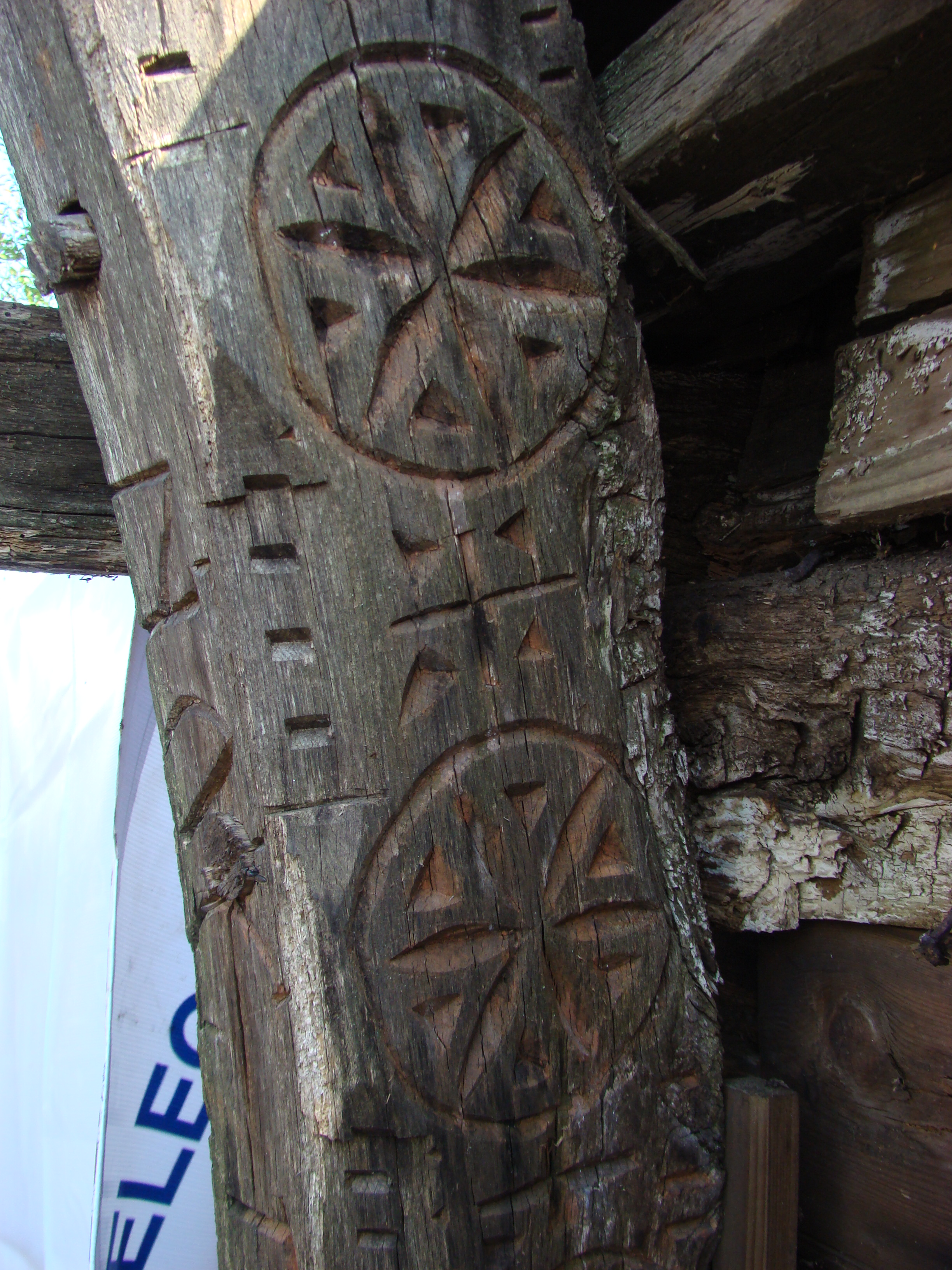 Biserica de lemn din Almașul Mic-Hunedoara